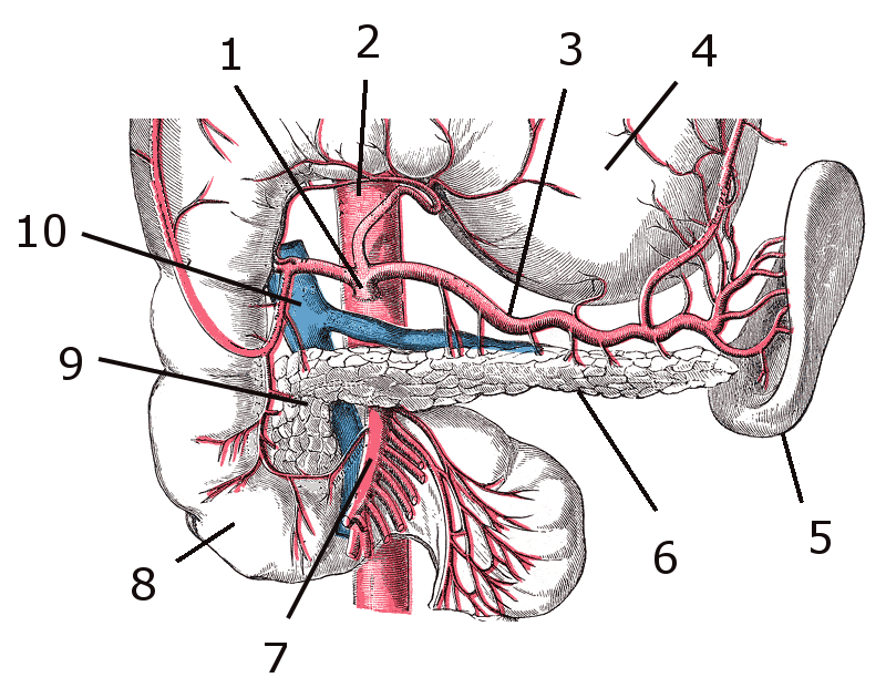 Anatomía del páncreas indicando la vascularización